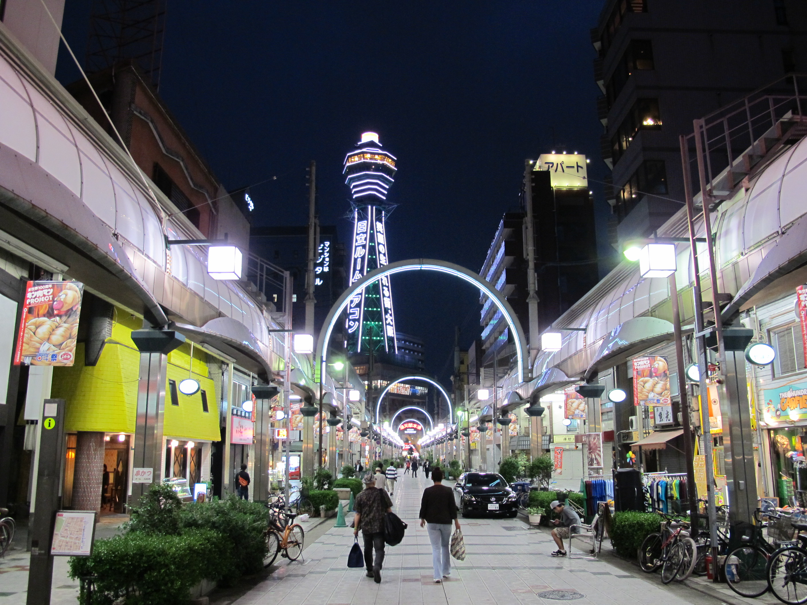 Shinsekai e tsutenkaku